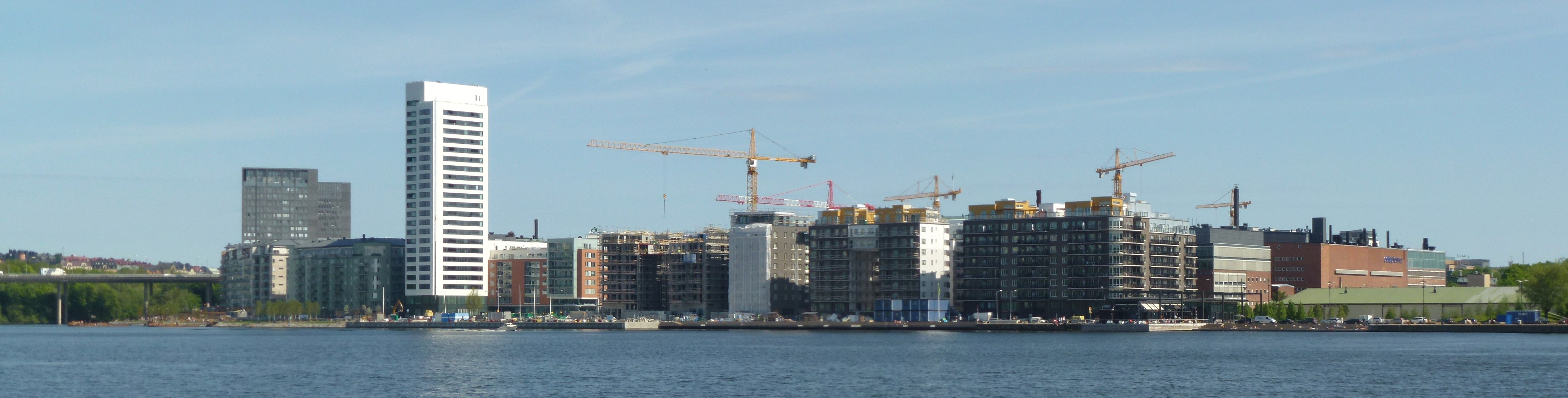 Hornsbergs strand panorama maj 2012, från Minneberg